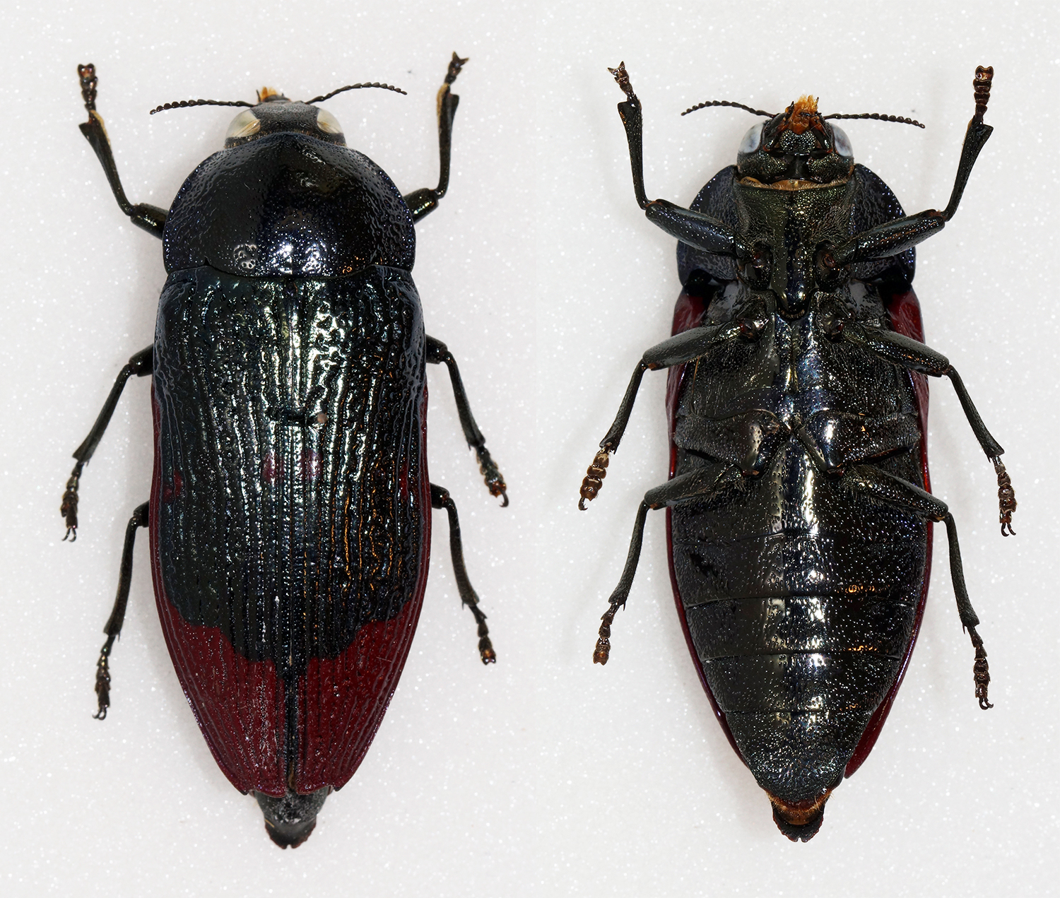 Saunders,1868 Sex: ? Data: Western Australia Size: 40mm